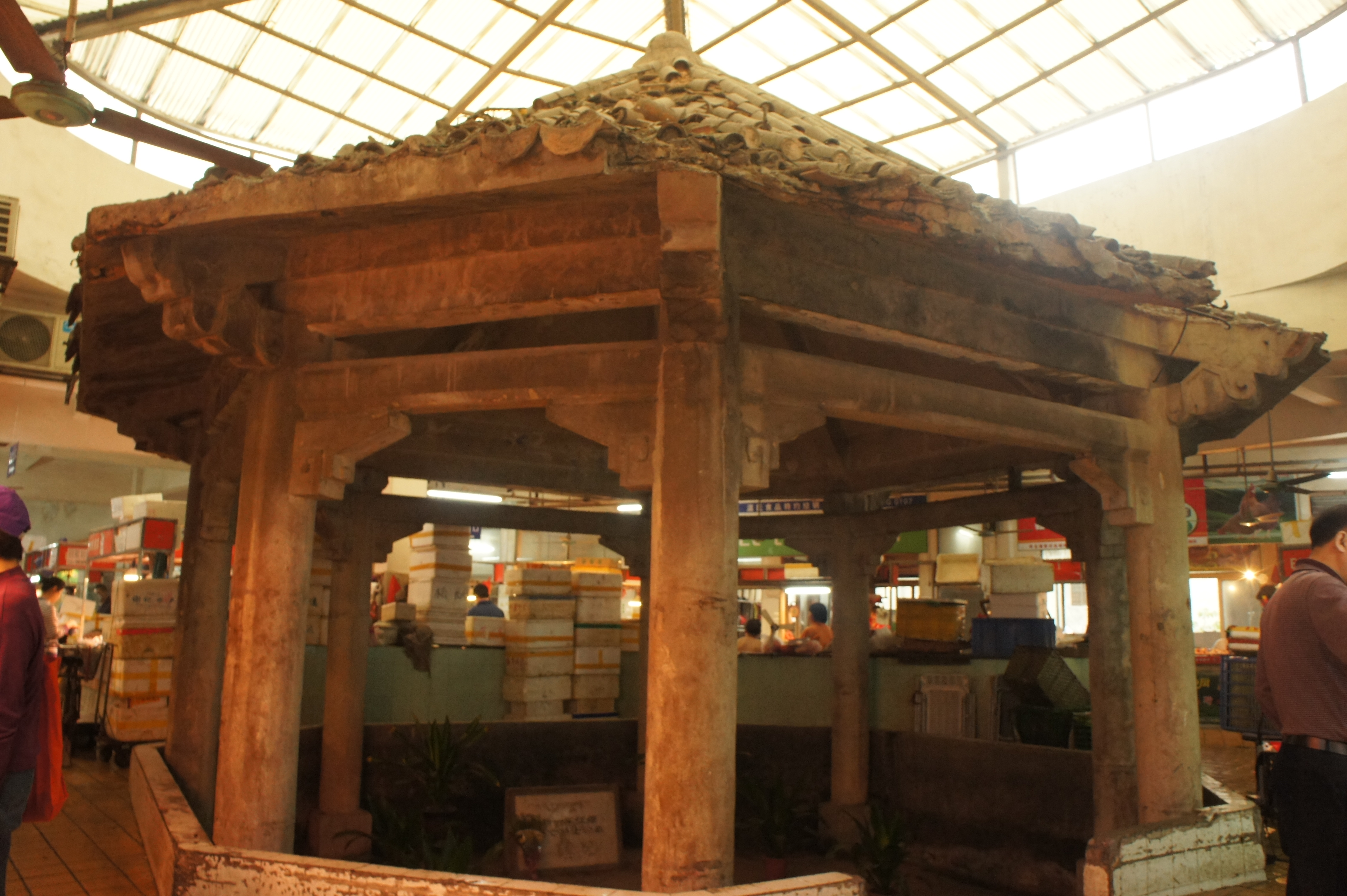 廣州市新一軍印緬陣亡將士公墓紀功亭。